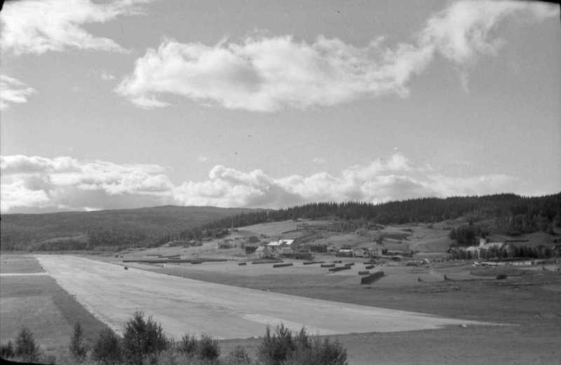 Hattfjelldal flyplass